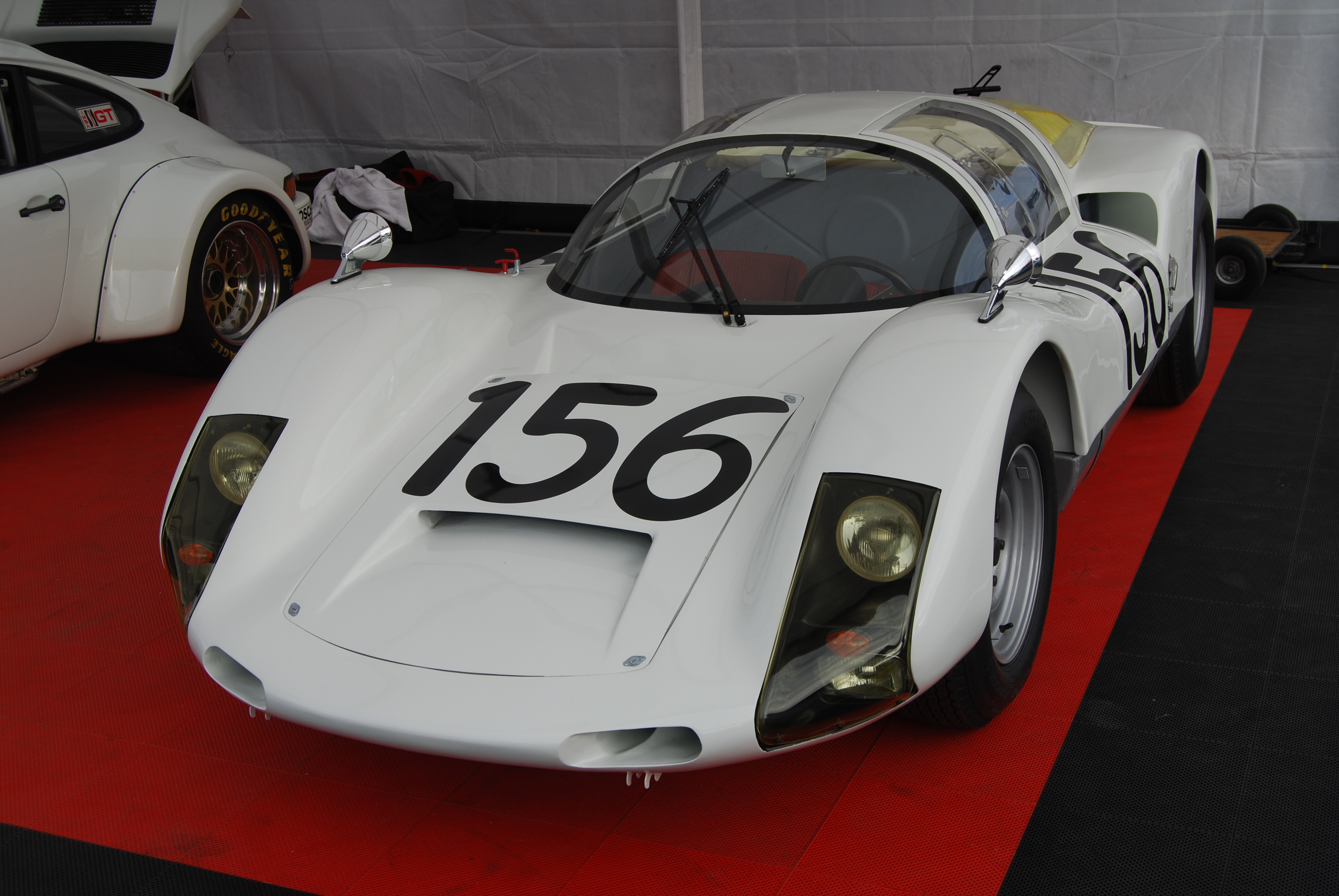 06i5_DSC_0464